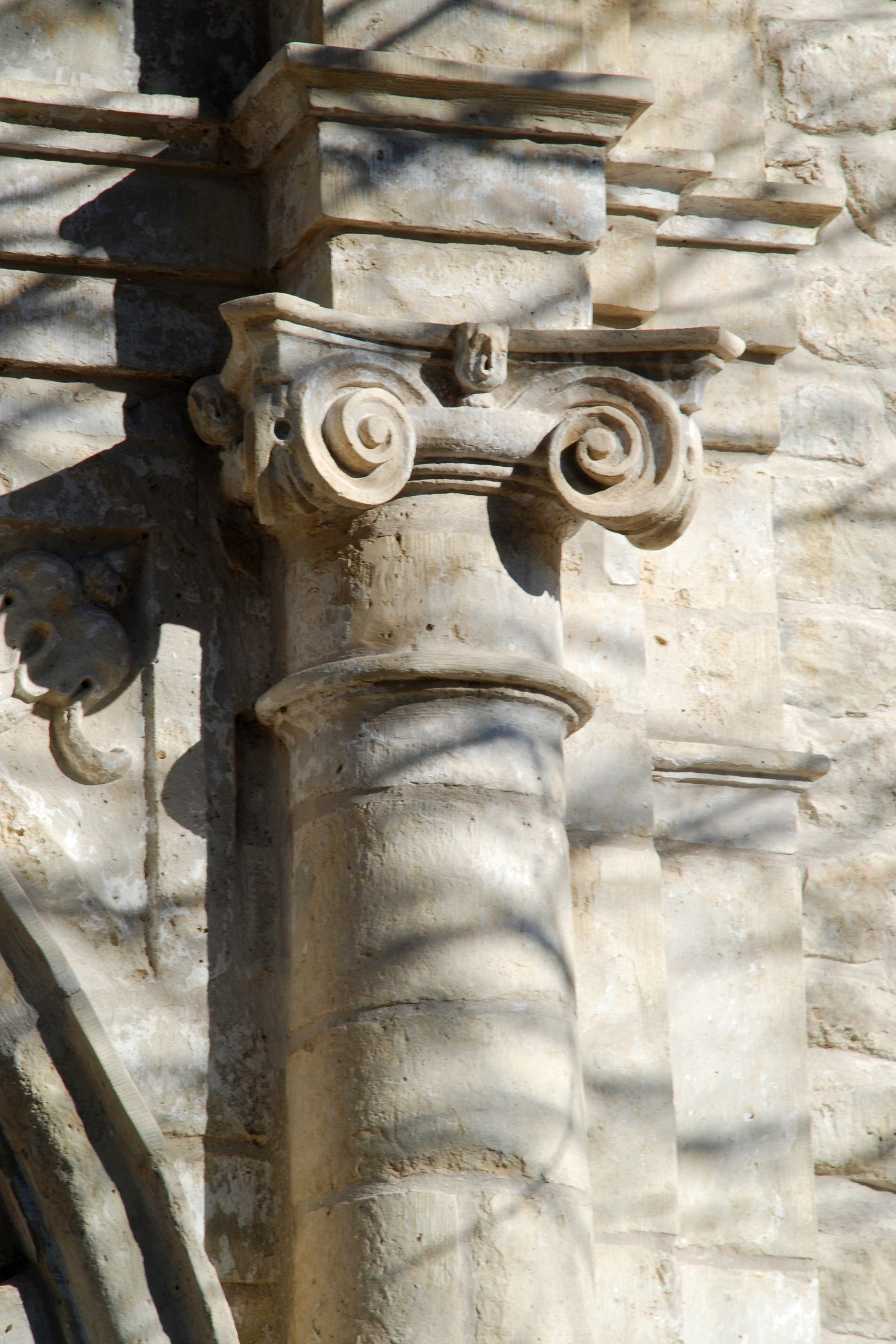 Belgique - Brabant flamand - Steenokkerzeel - Église Sainte-Catherine de Humelgem